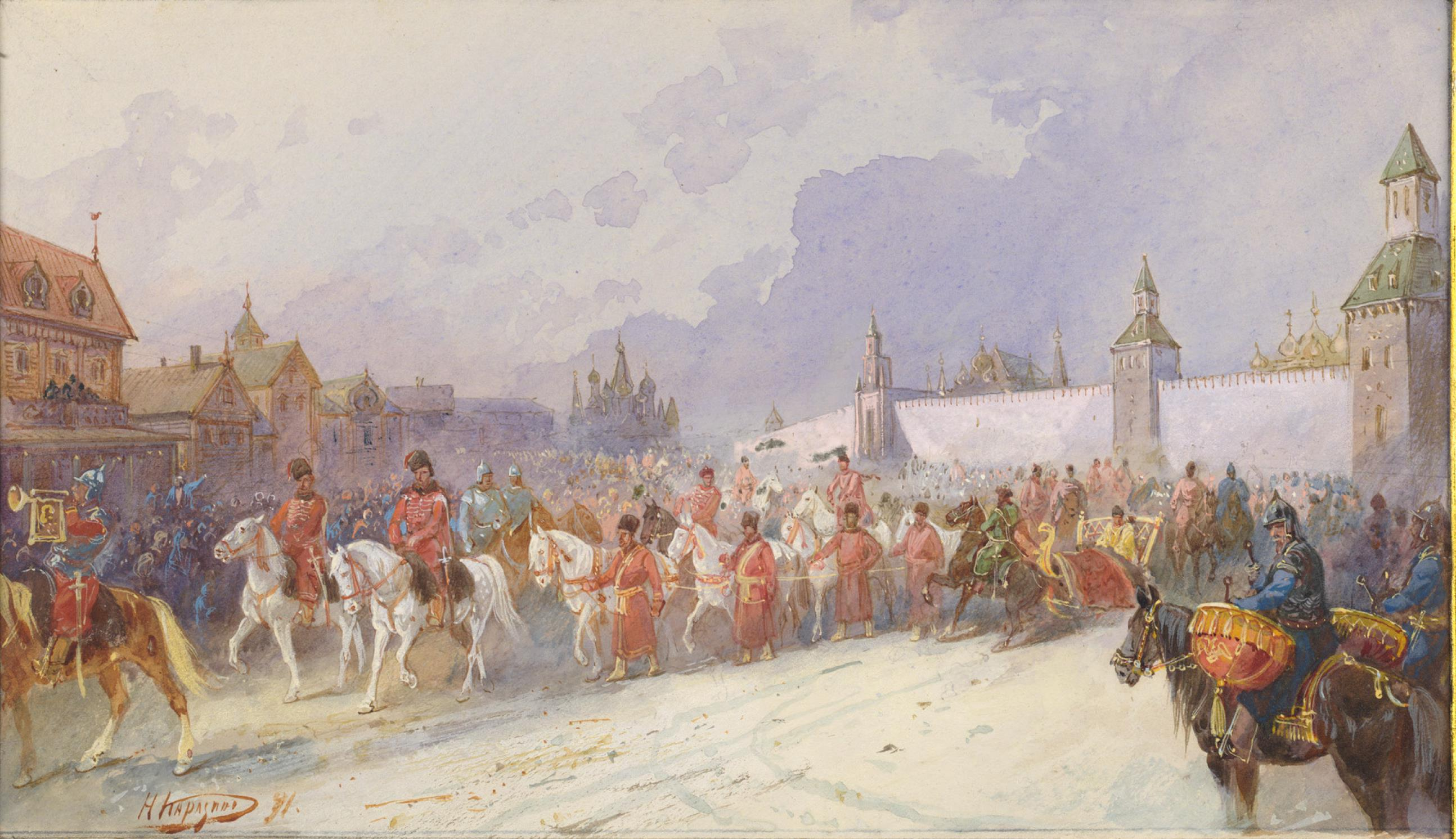 Пленное семейство сибирского хана Кучума в Москве